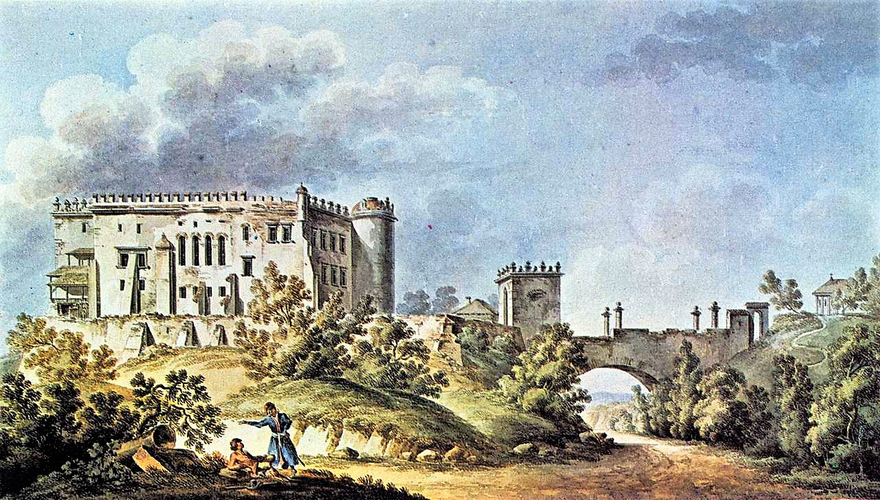 Widok zamku w Ossolinie. Akwarela. 36 x 56,6 cm.